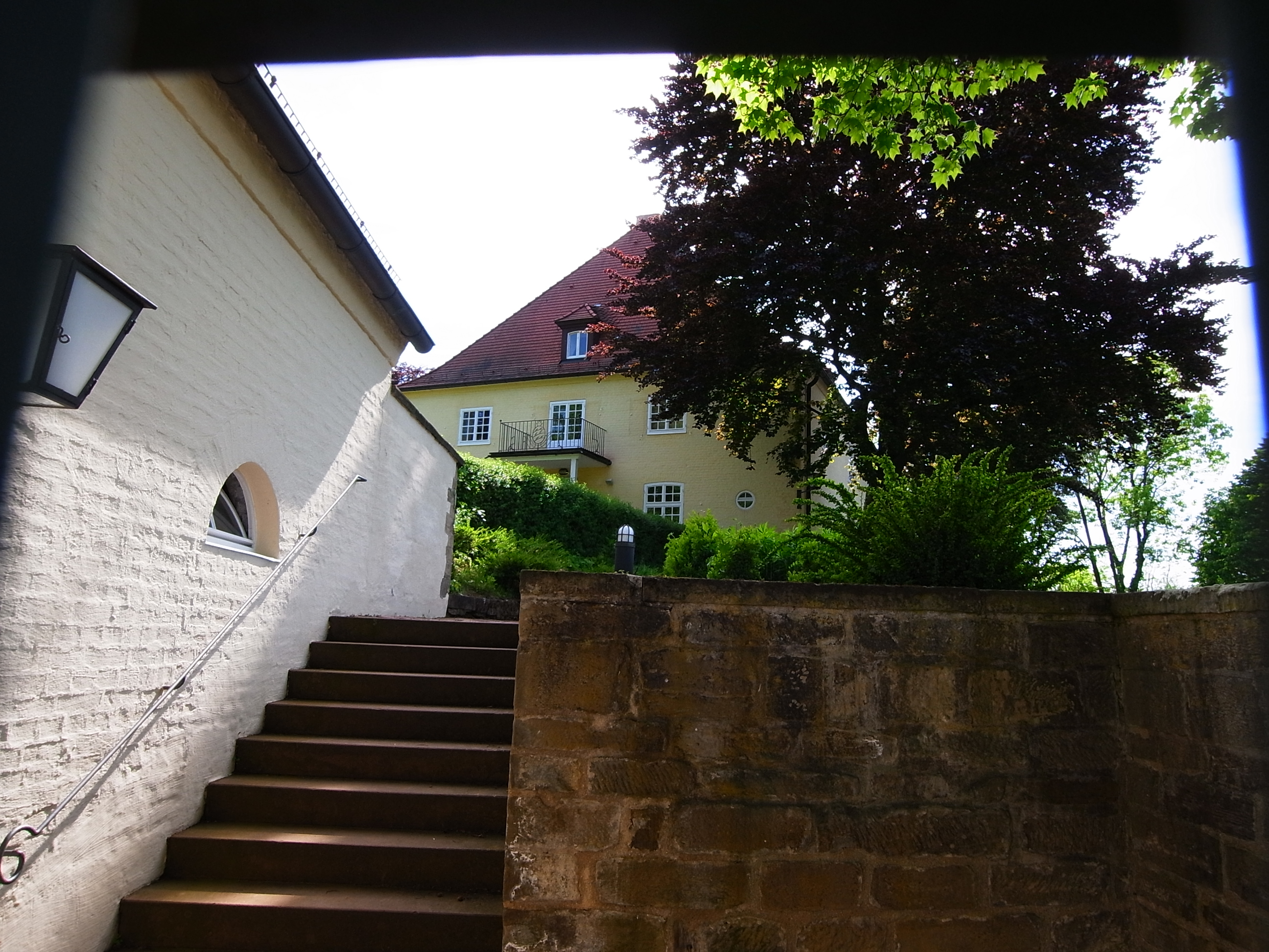 Die ehemalige Villa des Lederfabrikanten Roser (Stuttgart-Nord)